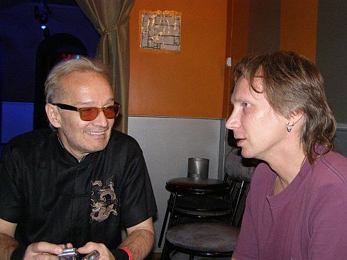 Ляпин и Курылев перед концертом "FeedBack"